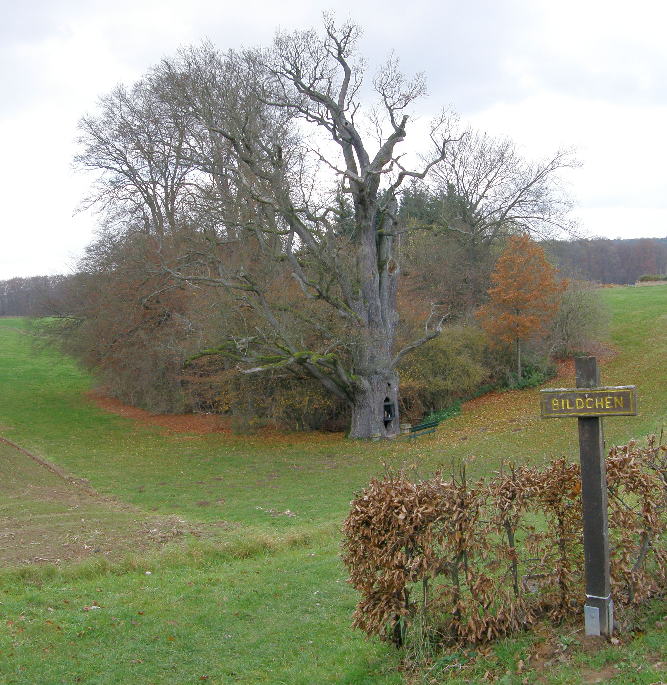 Heeschbrecher Bildchen